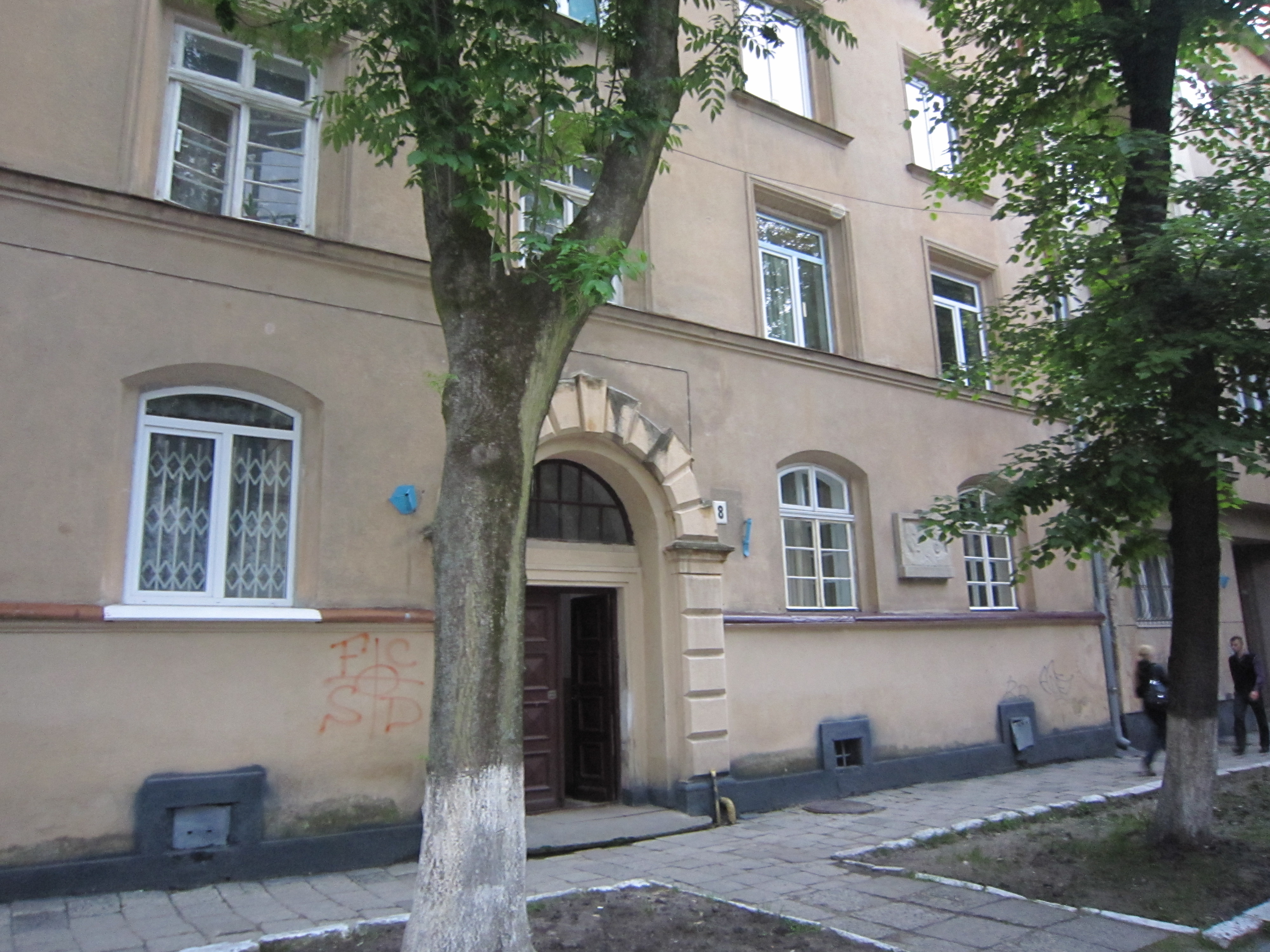 Оселя Сельських. будинок на теперішній вул. Академіка Павлова, 8 у Львові